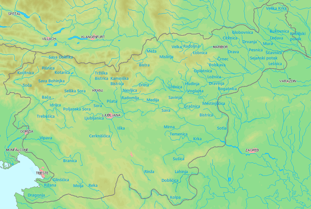 La fluoj slovenaj.